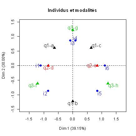 Exemple de représentation des individus (en bleu) et des modalités (couleur selon la variable) en ACM (via FactoMineR).